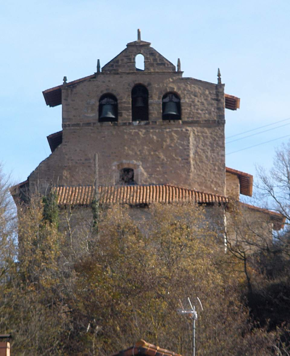 Trokoniz (Álava) - Iglesia de San Vicente